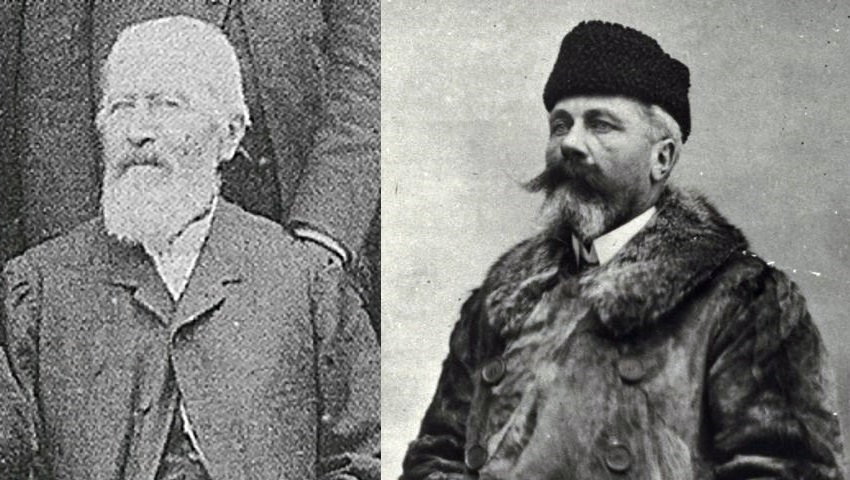 Arthur de Buyer (à gauche) et Léon Poussigue (à droite), respectivement président et directeur des houillères de Ronchamp.